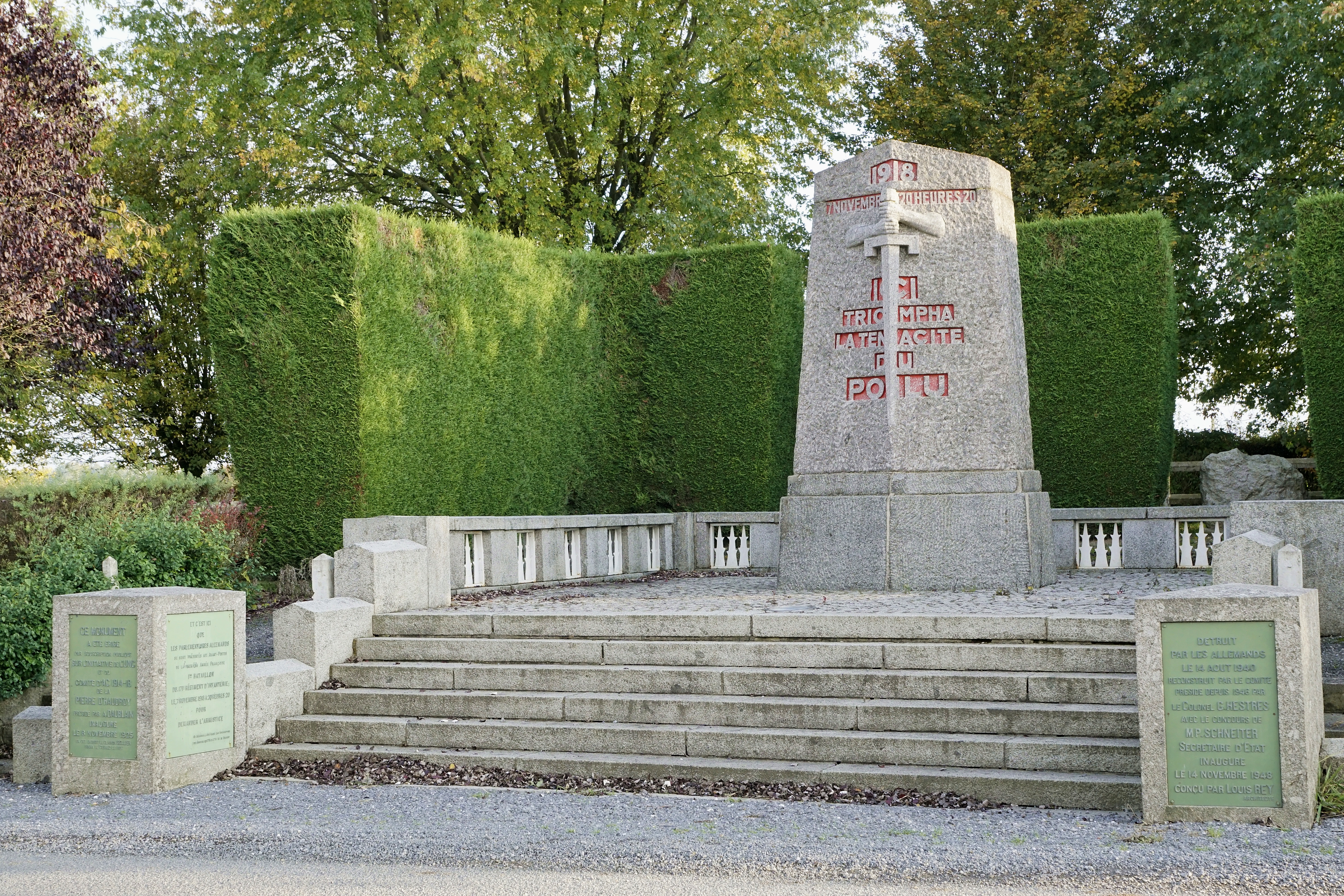 Monument édifié à La Flamengrie (02), à l'endroit où les plénipotentiaires allemands ont contacté l'armée française, le 07 Novembre 1918, pour demander l'armistice.